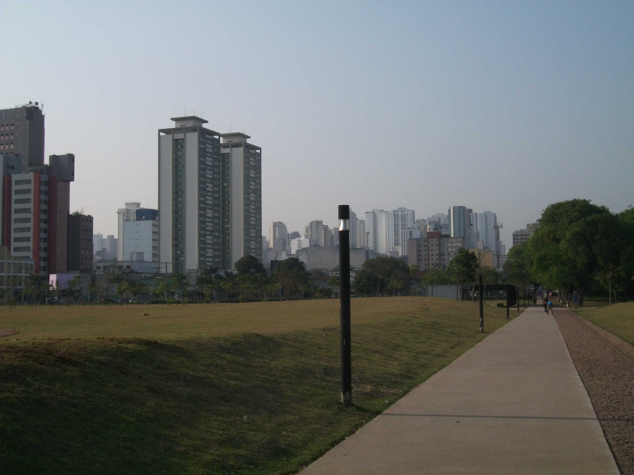 Vista do bairro de Santana e do Carandiru a partir do Parque da Juventude em São Paulo - SP.